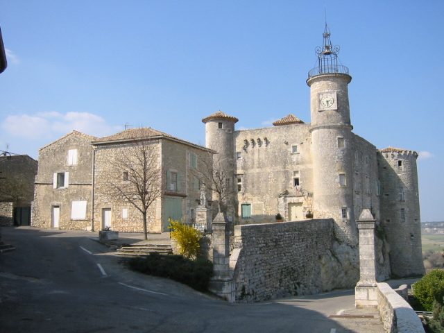 Village provençal de Lussan dans le Gard (France)